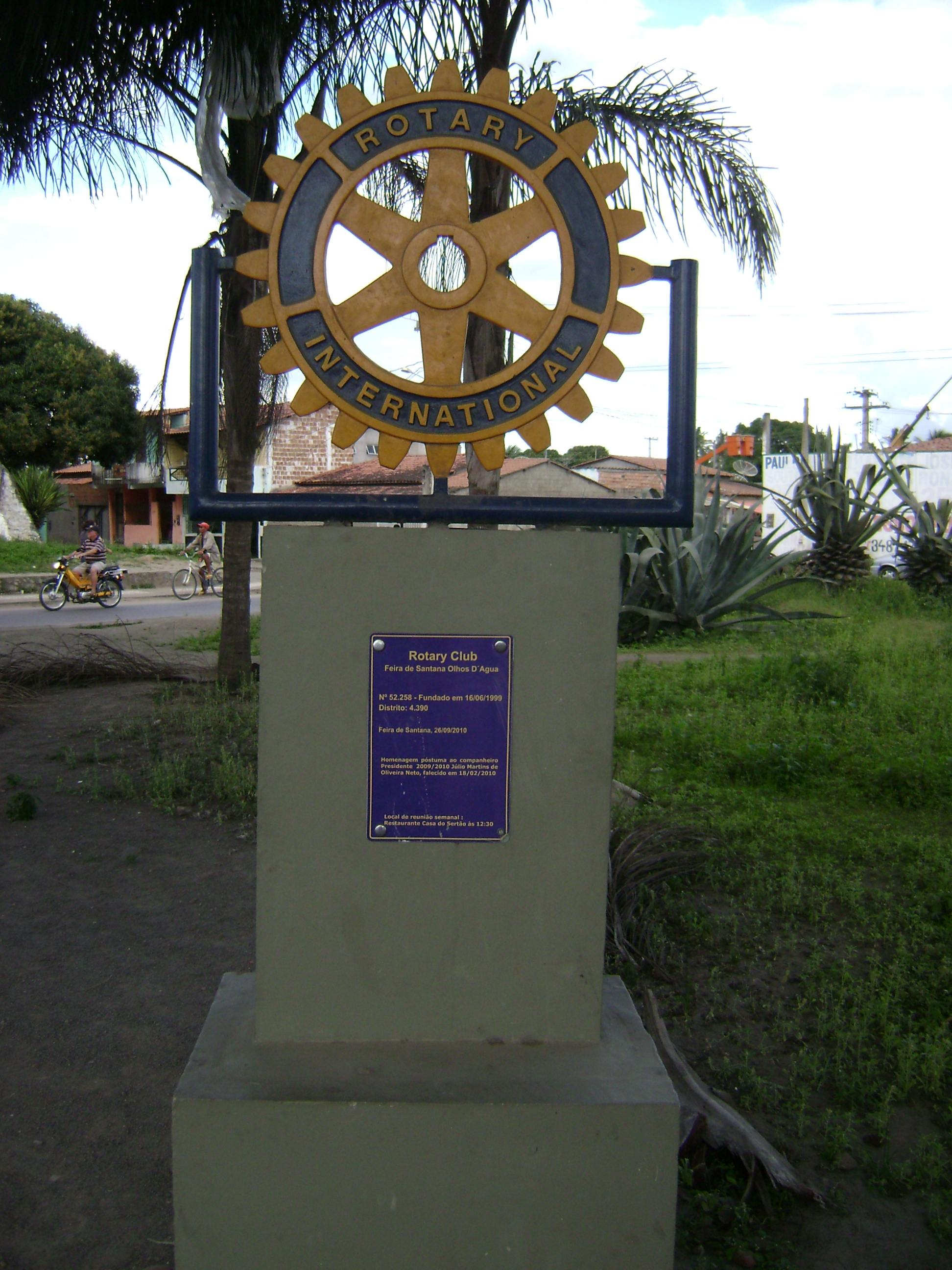 Inscrição do Rotary em Feira de Santana.